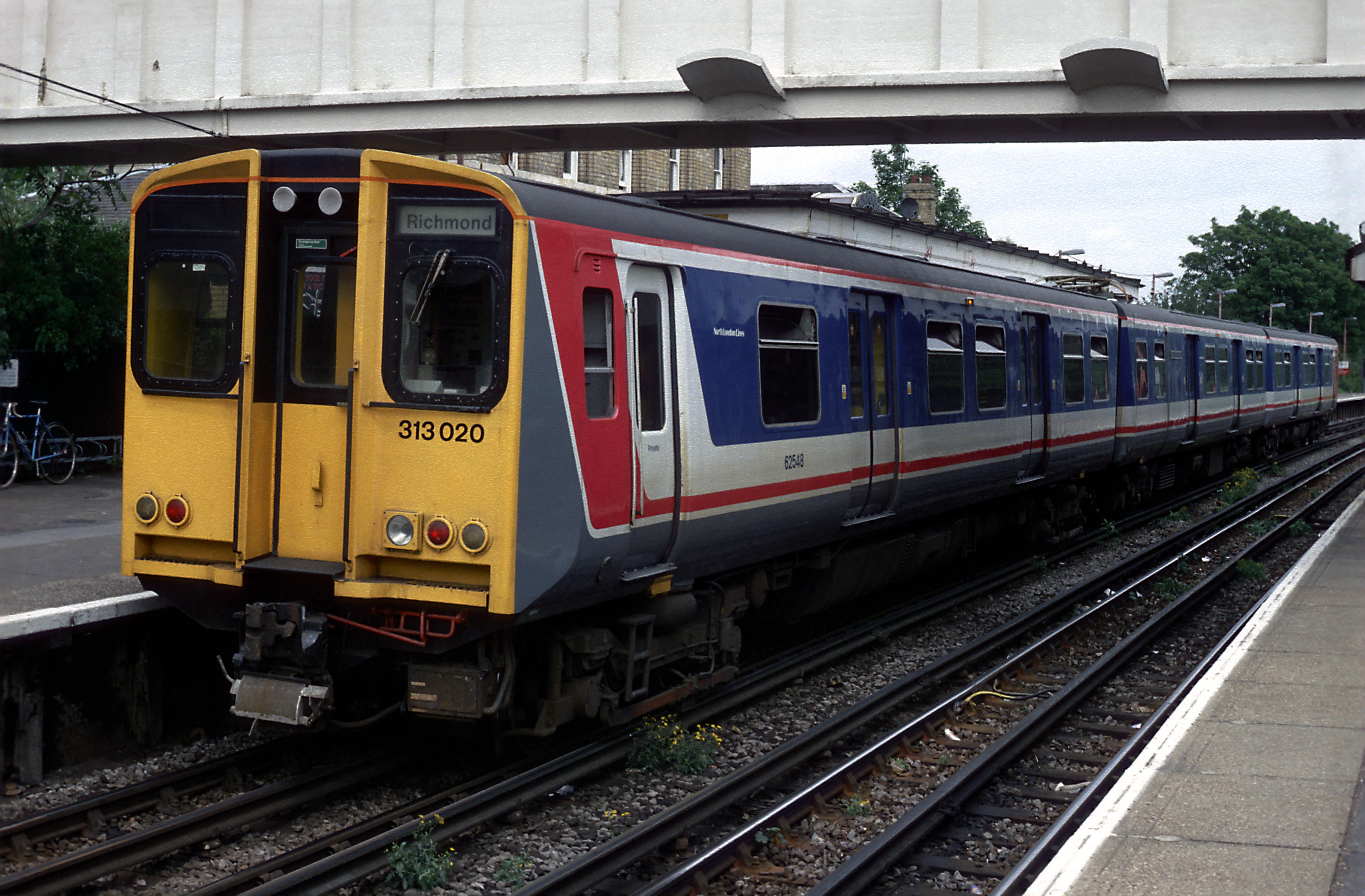 Zweisystemtriebzug auf der North London Line (Richmond–North Woolwich), Gemeinschaftsbetriebsstrecke mit der District Line von London Transport zwischen Richmond und Gunnersbury, Nachschuss. Auf den Mischbetriebsstrecken ist die Rückleitungsschiene in Gleismitte mit den Fahrschienen verbunden.